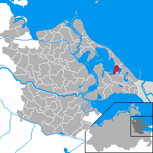 Pudagla, Landkreis Ostvorpommern, Mecklenburg-Vorpommern